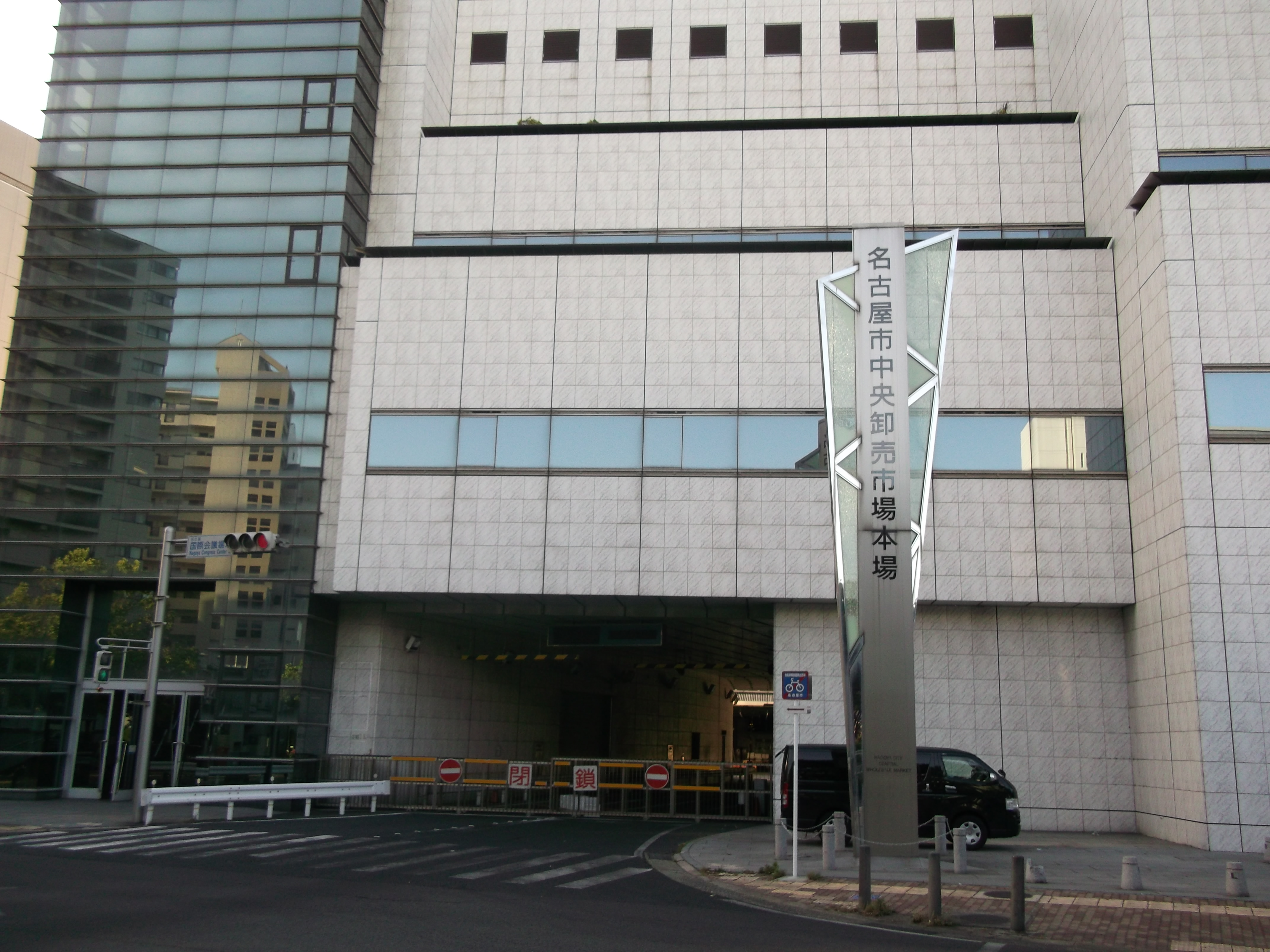 名古屋市熱田区の名古屋市中央卸売市場本場を南側公道南側から写す